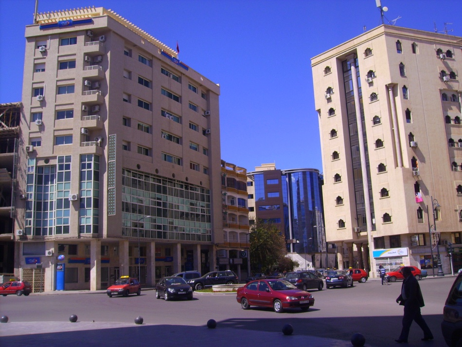 Oujda la ville nouvelle autour du Bd Mohamed V (ex-bd de Paris)